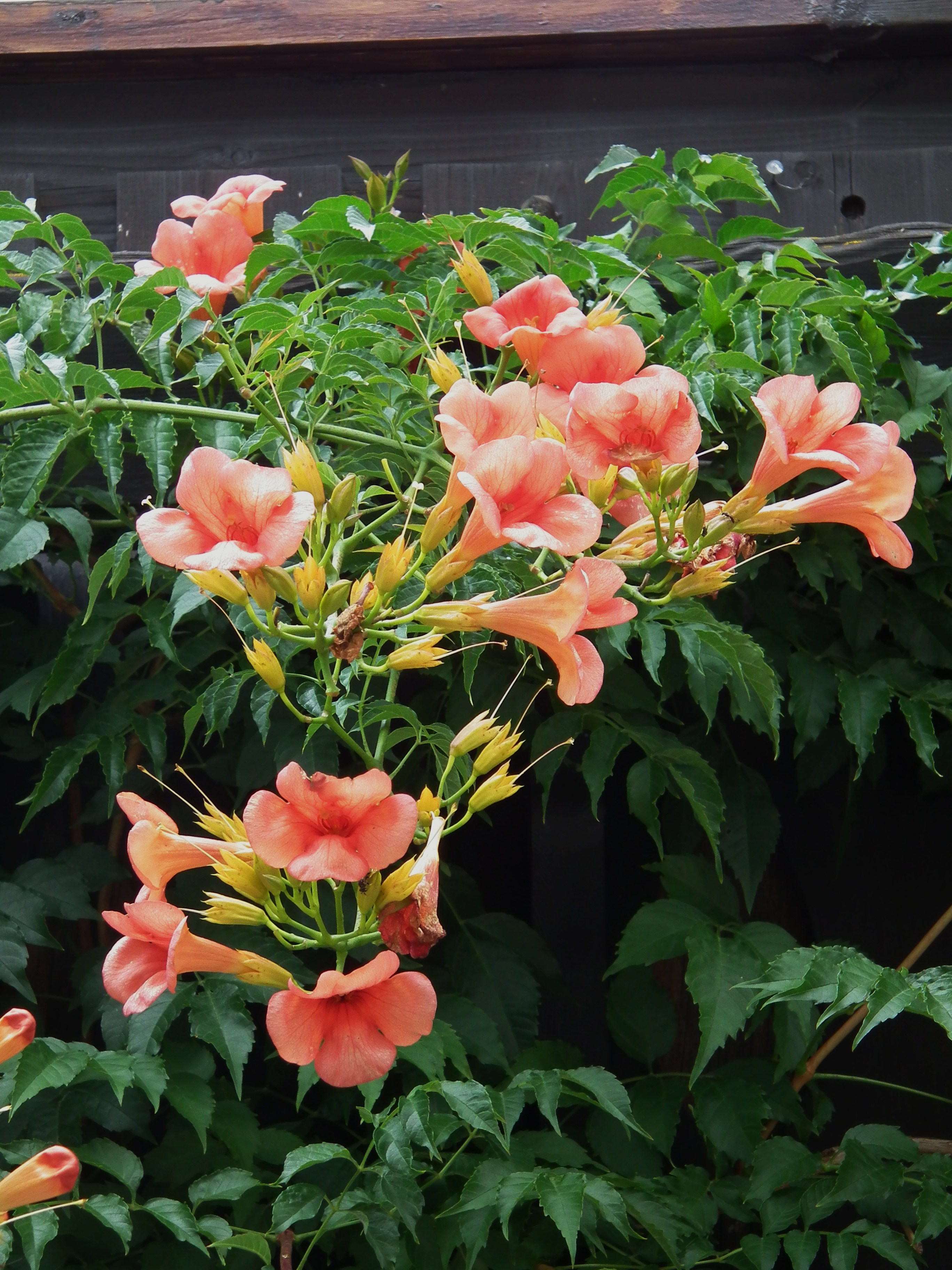 Trompetenblume (Campsis), fotografiert in Rheinland-Pfalz (Deutschland)